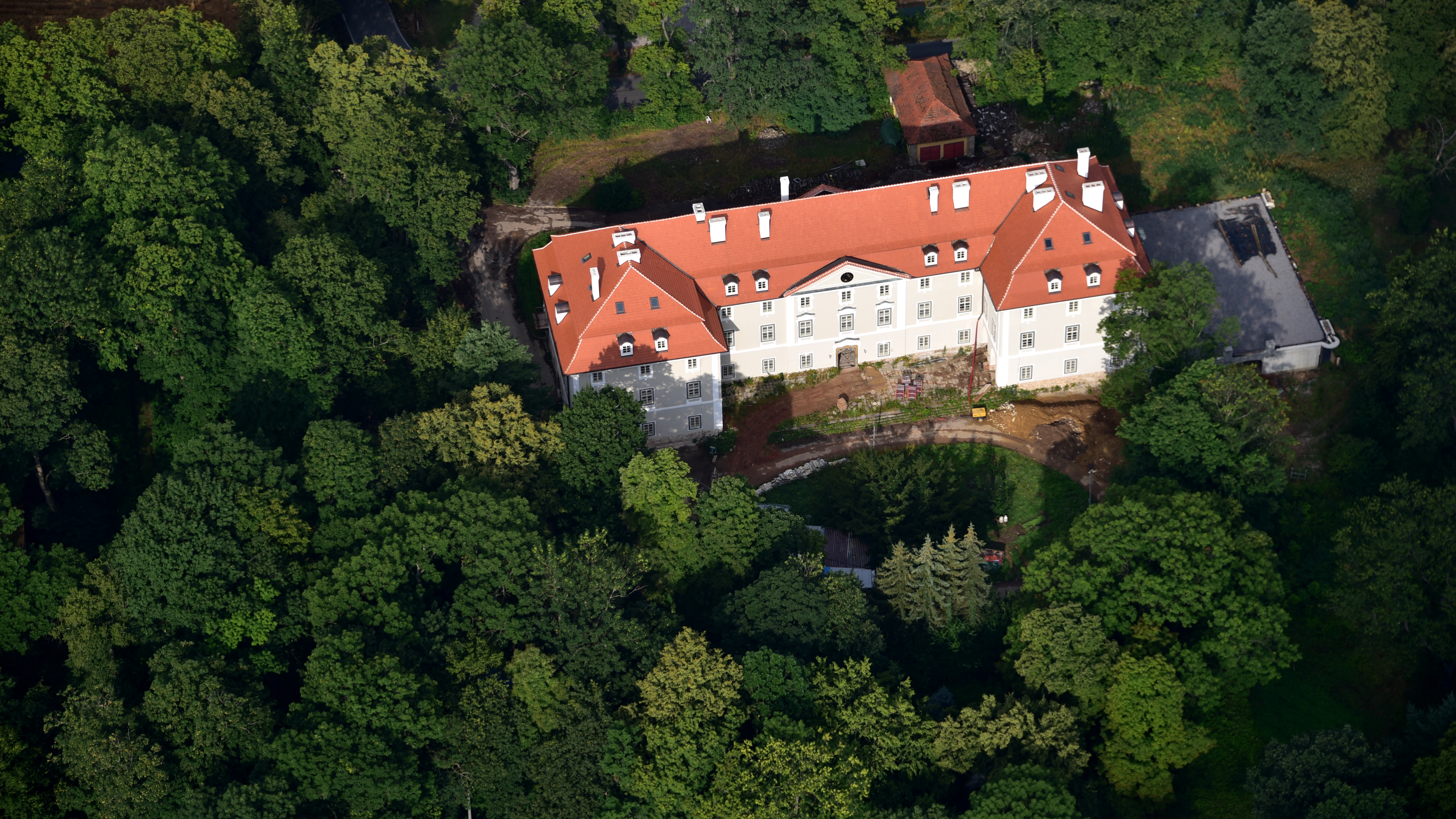 CZ - Osov bei Hostomice pod Brdy, Schloss Osov, Luftaufnahme (2018)